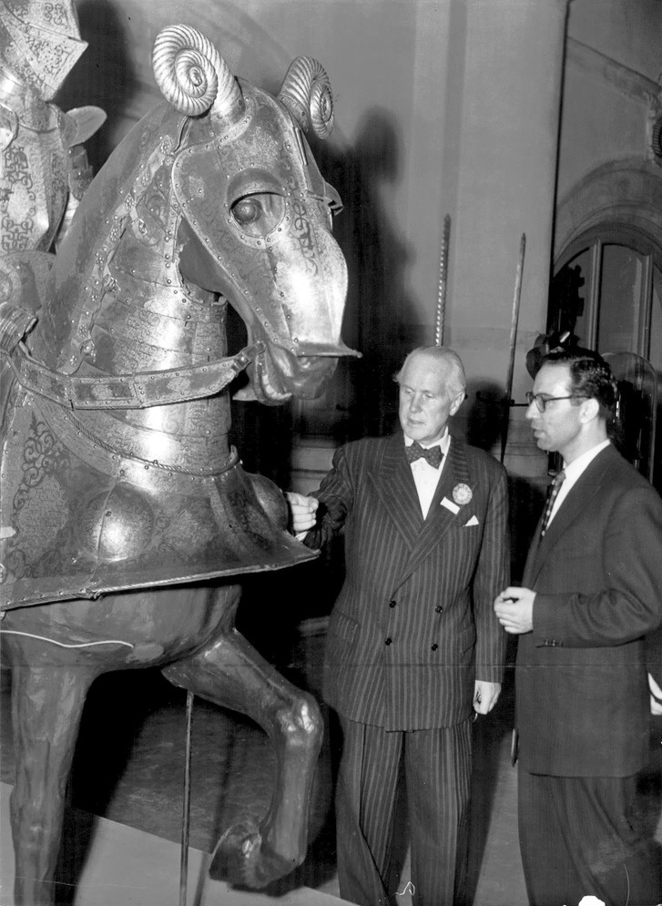 Professor Andreas Lindblom till vänster visar Démétre Loukatos en rustning som tillhört Sigismund II av Polen och Johan III.Gustav Vasa introducerades högtidligen för de 250 deltagarna i den första internationella kongressen för folklivsforskare efter kriget, då professor Andreas Lindblom hälsade välkommen i Nordiska museets stora sal vid det informella öppnandet på söndagen. Milles bistra kolossalstaty i ek såg nästan ut att vilja dra på munnen, då Salvador de Madariaga, president i International Commission on Folk Arts and Folklore, i ett svarstal förklarade att "varje människa absolut borde vara etnolog" – och i varje fall skrattade den samlade expertisen hjärtligt.